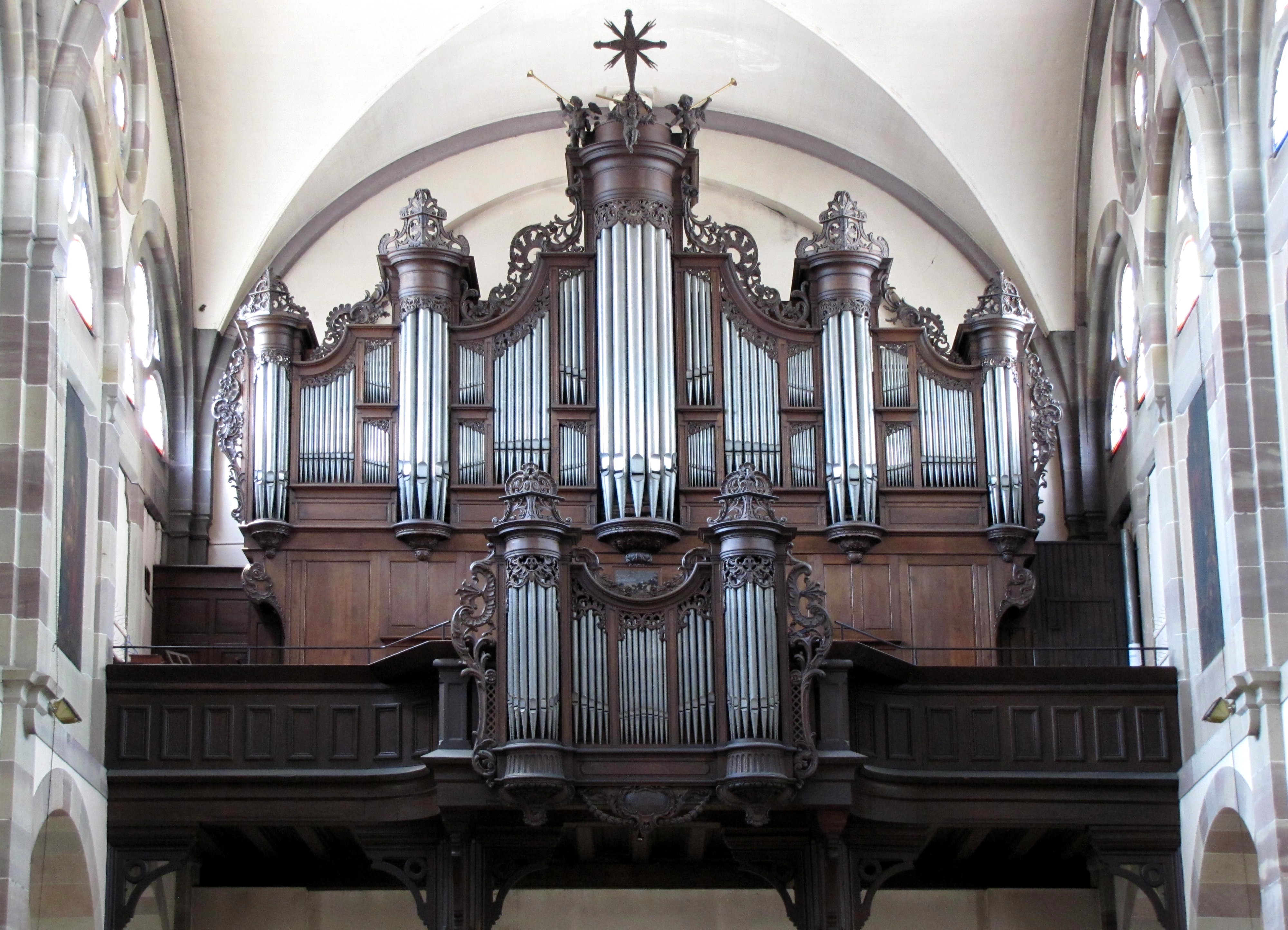 Alsace, Bas-Rhin, Église Saint-Martin d'Erstein (IA00023232). Orgue Rohrer-Roethinger (1741): This object is classé Monument Historique in the base Palissy, database of the French furniture patrimony of the French ministry of culture, under the references PM67001011 and IM67000371. This object is classé Monument Historique in the base Palissy, database of the French furniture patrimony of the French ministry of culture, under the references buffet+tribune PM67000739 buffet+tribune and instrument PM67000738 instrument.